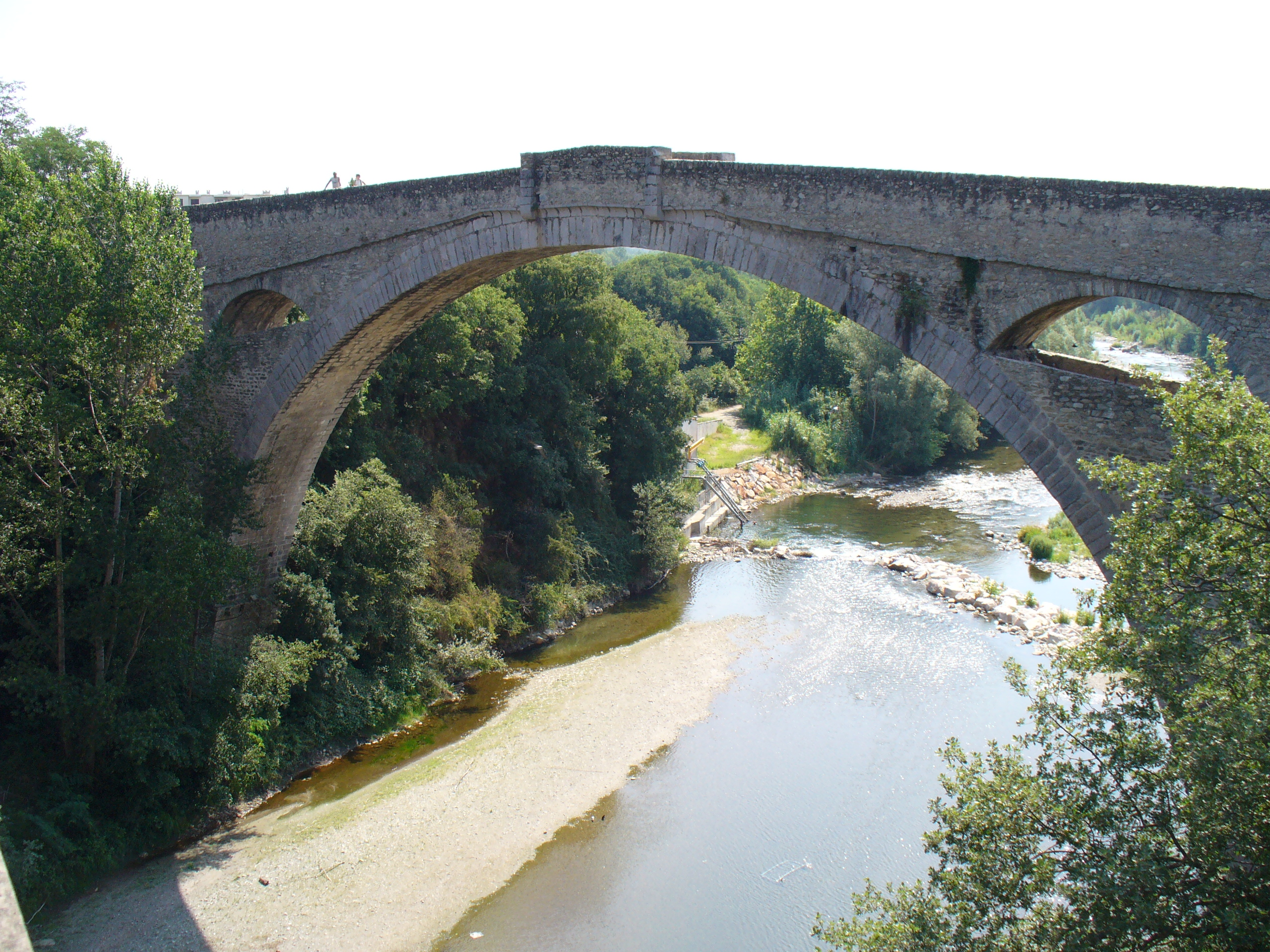 Die Brücke Pont du Diable in Céret, Frankreich .